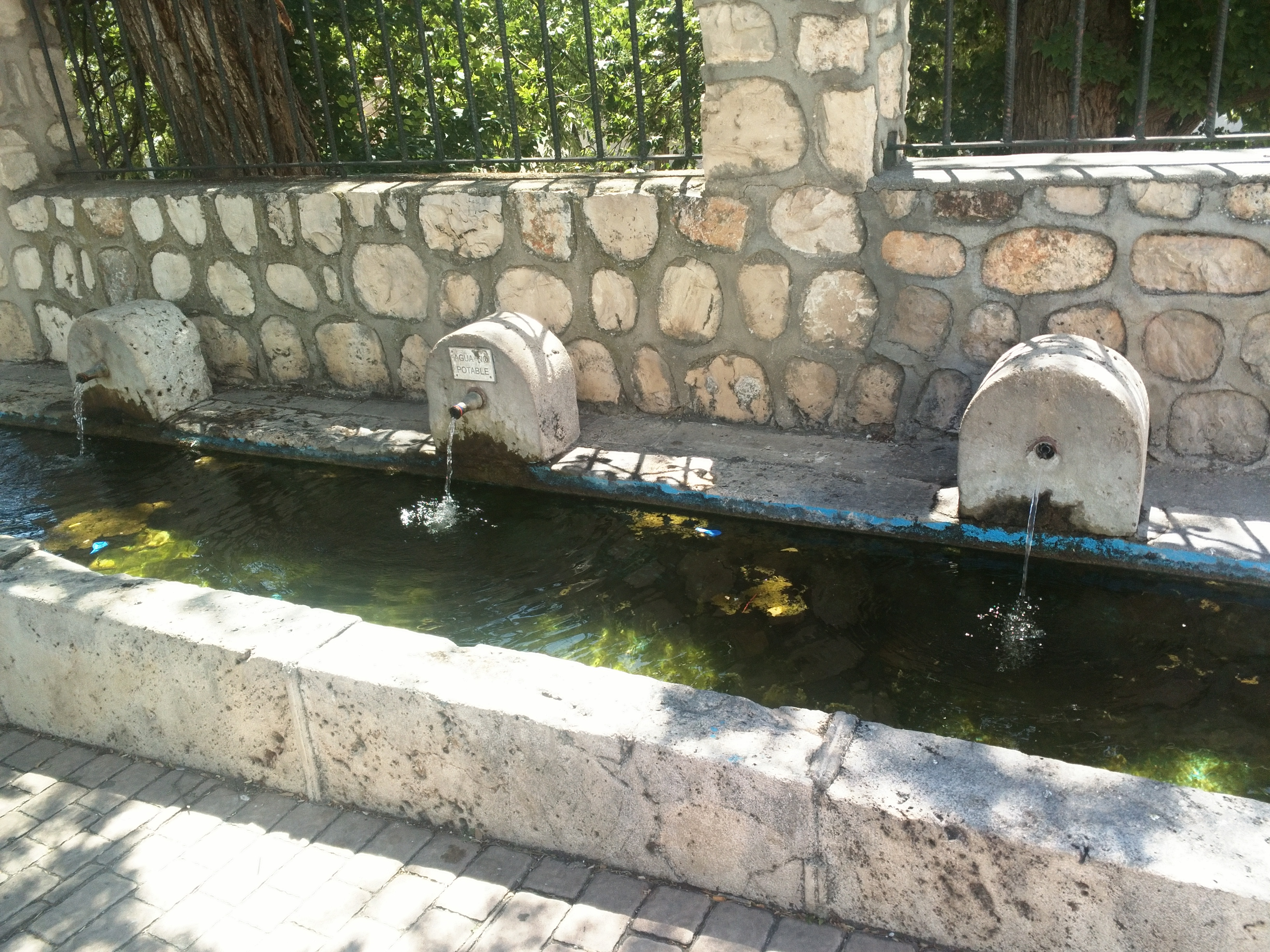 Fuente de la Primi en Orusco de Tajuña